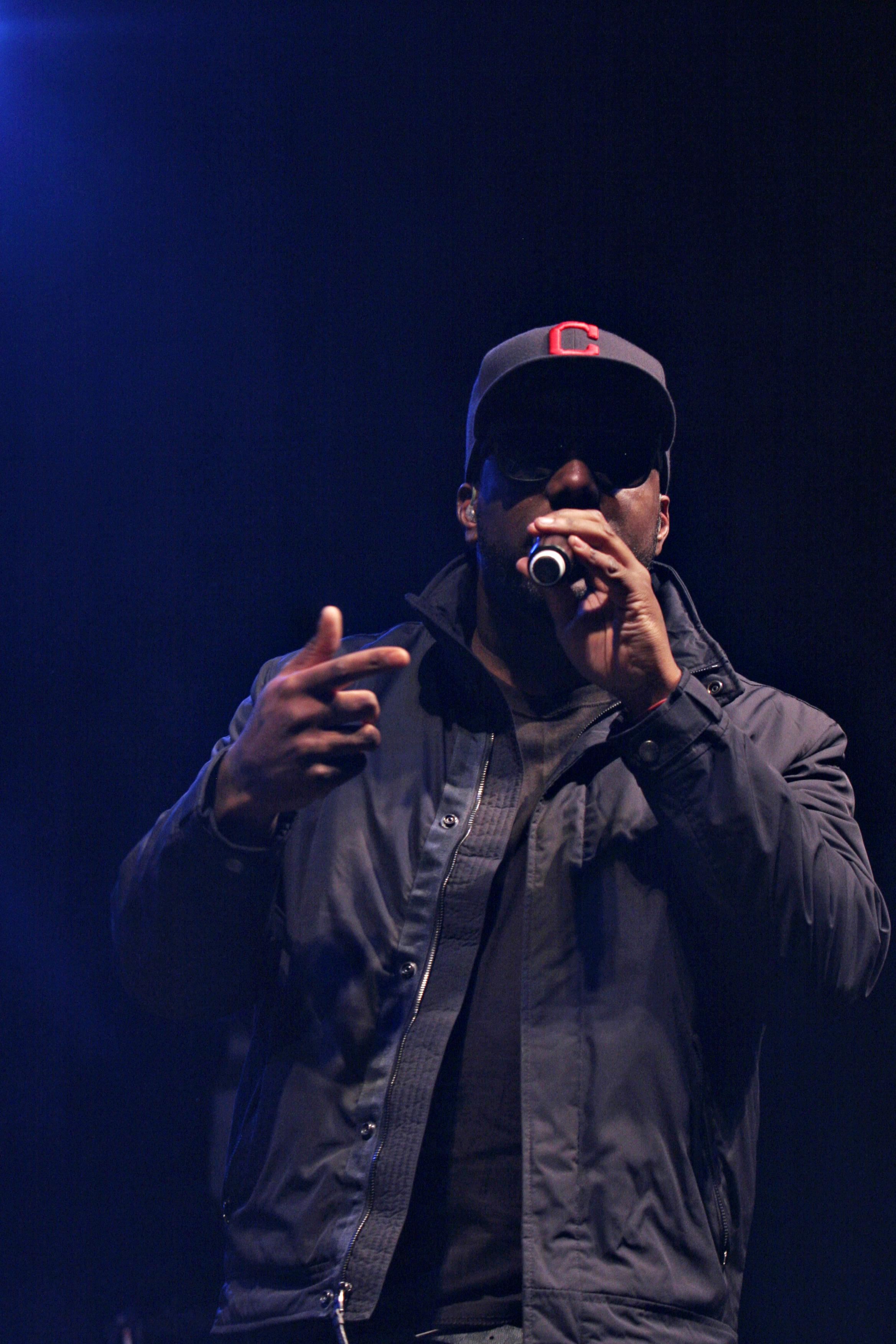 USG Programming November 4, 2010